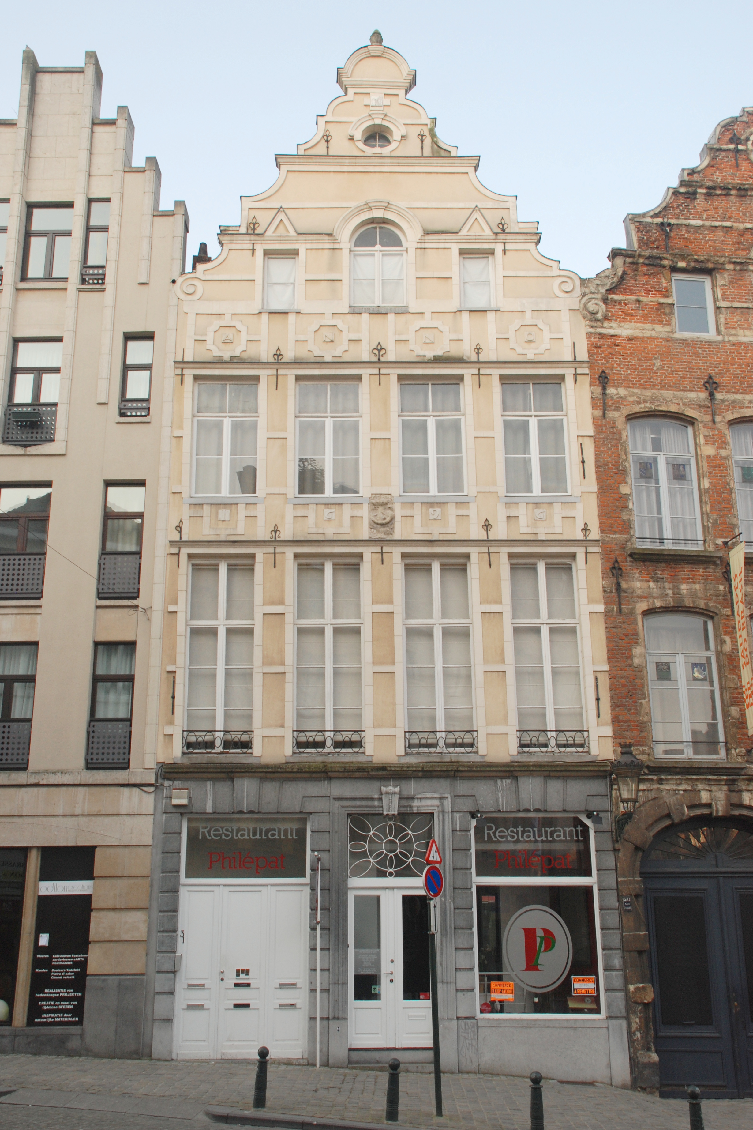 Belgique - Bruxelles - Place de la Vieille Halle aux Blés n°31 - Maison du Cornet (Den Hoorn)